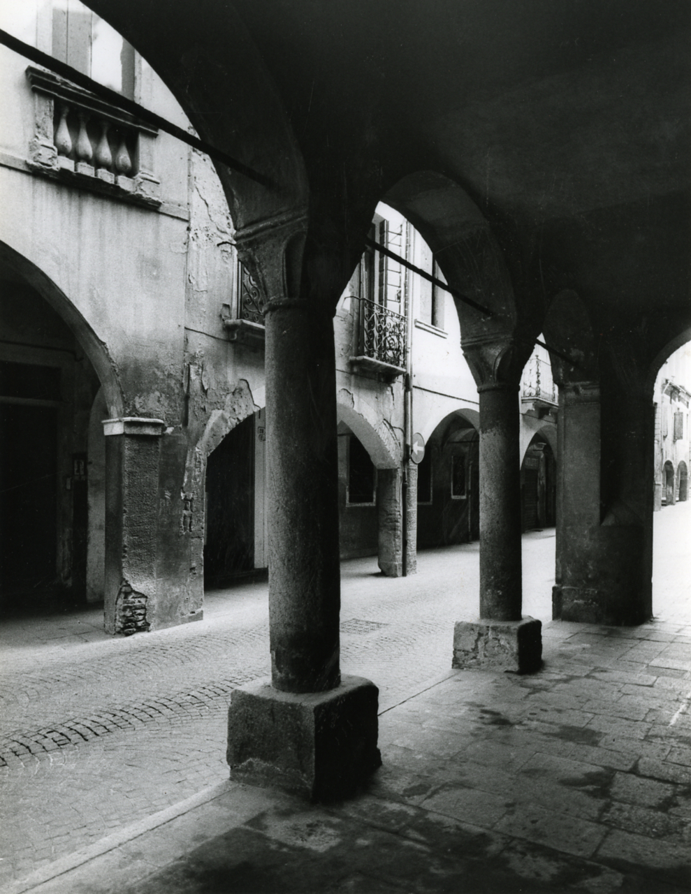 Servizio fotografico : Padova, 1967 / Paolo Monti. - Stampe: 9 : Positivo b/n, gelatina bromuro d'argento/ carta, 18x24. - ((Al verso delle stampe manoscritti i numeri dei negativi corrispondenti (formato 35 mm): 371 (lo stesso numero identifica 3 stampe), 374, 381, 395 (lo stesso numero identifica 2 stampe), 397 (lo stesso numero identifica 3 stampe); iscrizioni didascaliche manoscritta a matita: "Casa del Falloppio", "Palazzina Gaudio (via Belzani)", "Antica casa porticata/ di via C. Battisti", "Casa medioevale/ di via S. Lucia", "Palazzo [illeggibile]/ e via dei Rosati", "Palazzetto malconcio/ di via dei Rosati/ (presso la casa del Palladio", "Via S. Francesco"; timbro a inchiostro con copyright: "© - Credit to:/ Paolo Monti/ Via T. Tasso [...]/ Milano [...]". - Sul coperchio della scatola iscrizione didascalica manoscritta a pennarello nero: "Bologna/ Città storiche". - Occasione: Documentazione per la pubblicazione: Diego Valeri (a cura di), "Padova: i secoli, le ore", Bologna, Edizioni Alfa, 1967. - Fonte: Monografia di Valeri Diego (a cura di): Padova: i secoli, le ore, Bologna, Edizioni Alfa (1967). - Fonte: Agenda di Paolo Monti: Monti/ 3 aprile 1966 - 9 marzo 1971/ 12421-16823 (1966-1971), presso Archivio Paolo Monti